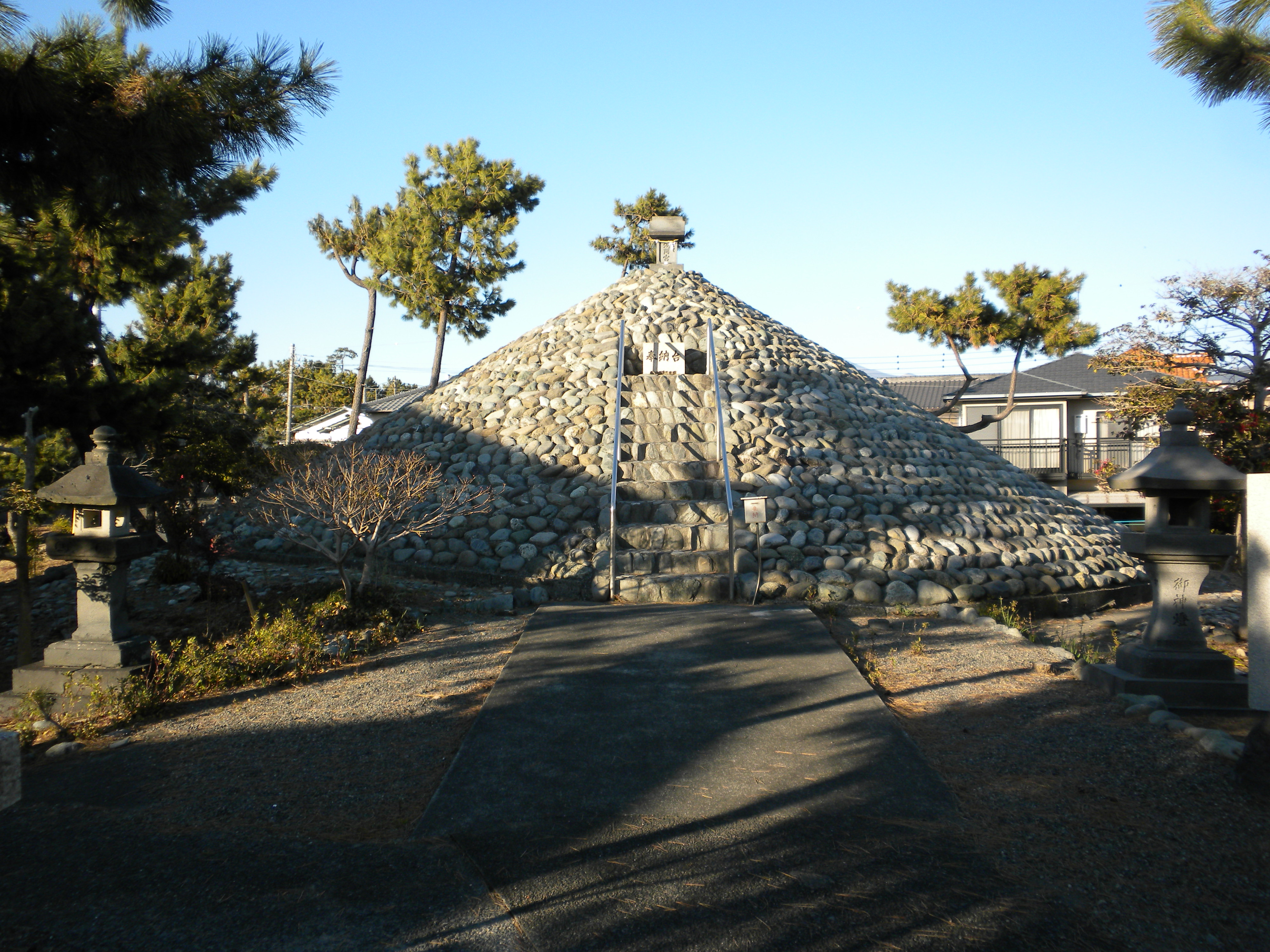 富士塚（静岡県富士市鈴川、1976年に古老の記憶に従い復元されたもの）